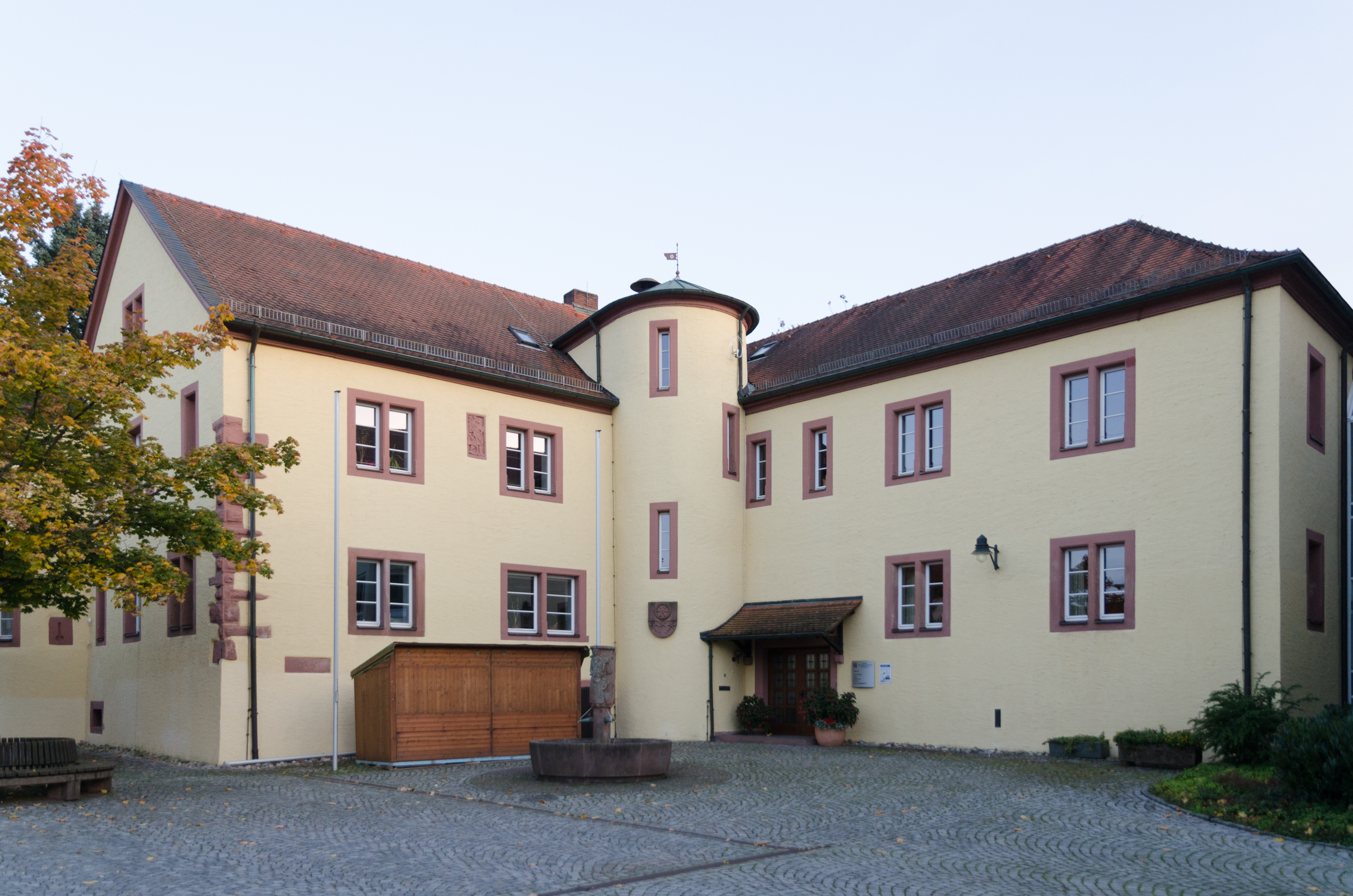 Schöllkrippen, Marktplatz 1